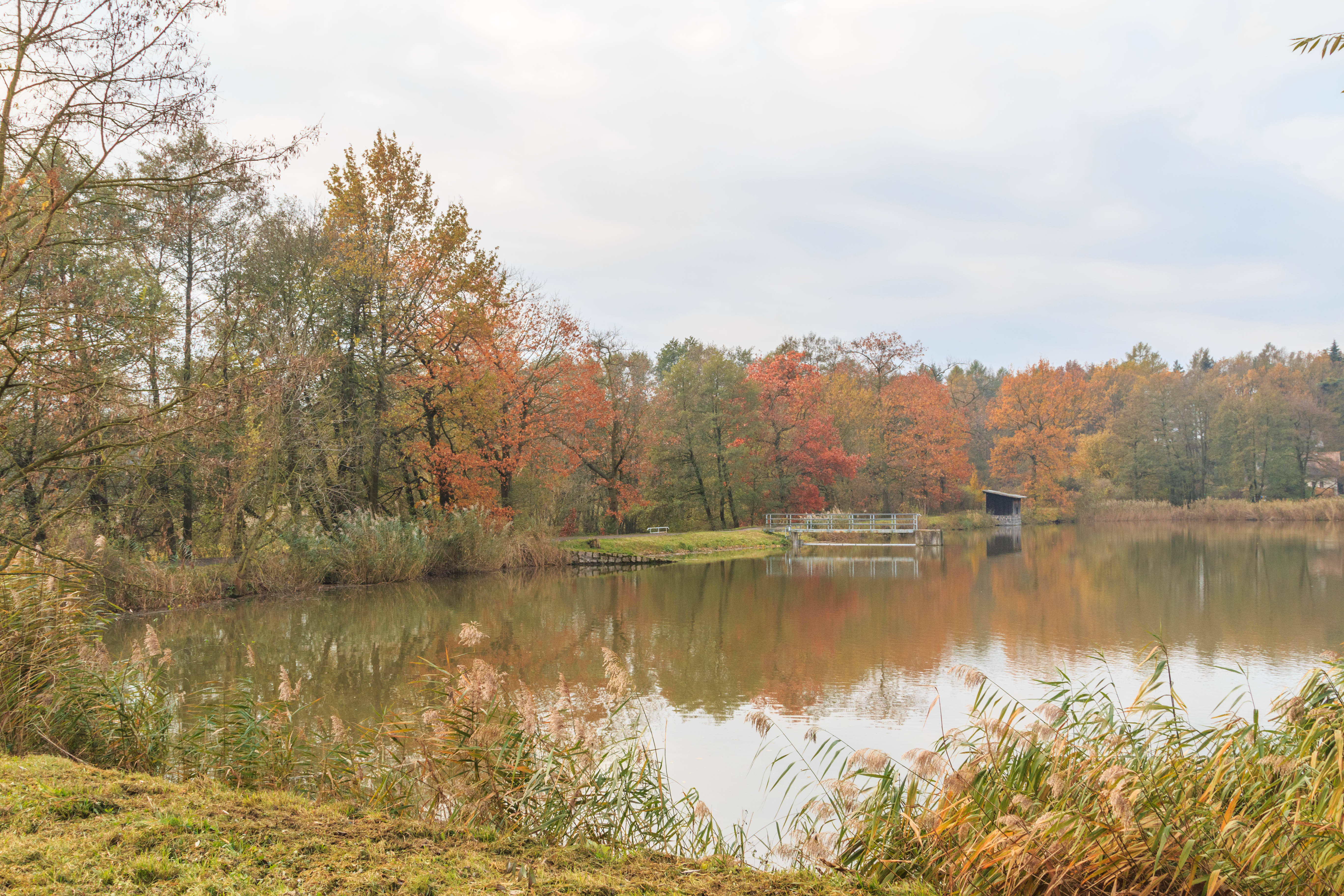 rybník Trhoňka Project: Vodstvo.